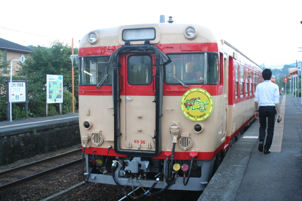 JR久大本線向之原駅に停車中の列車。